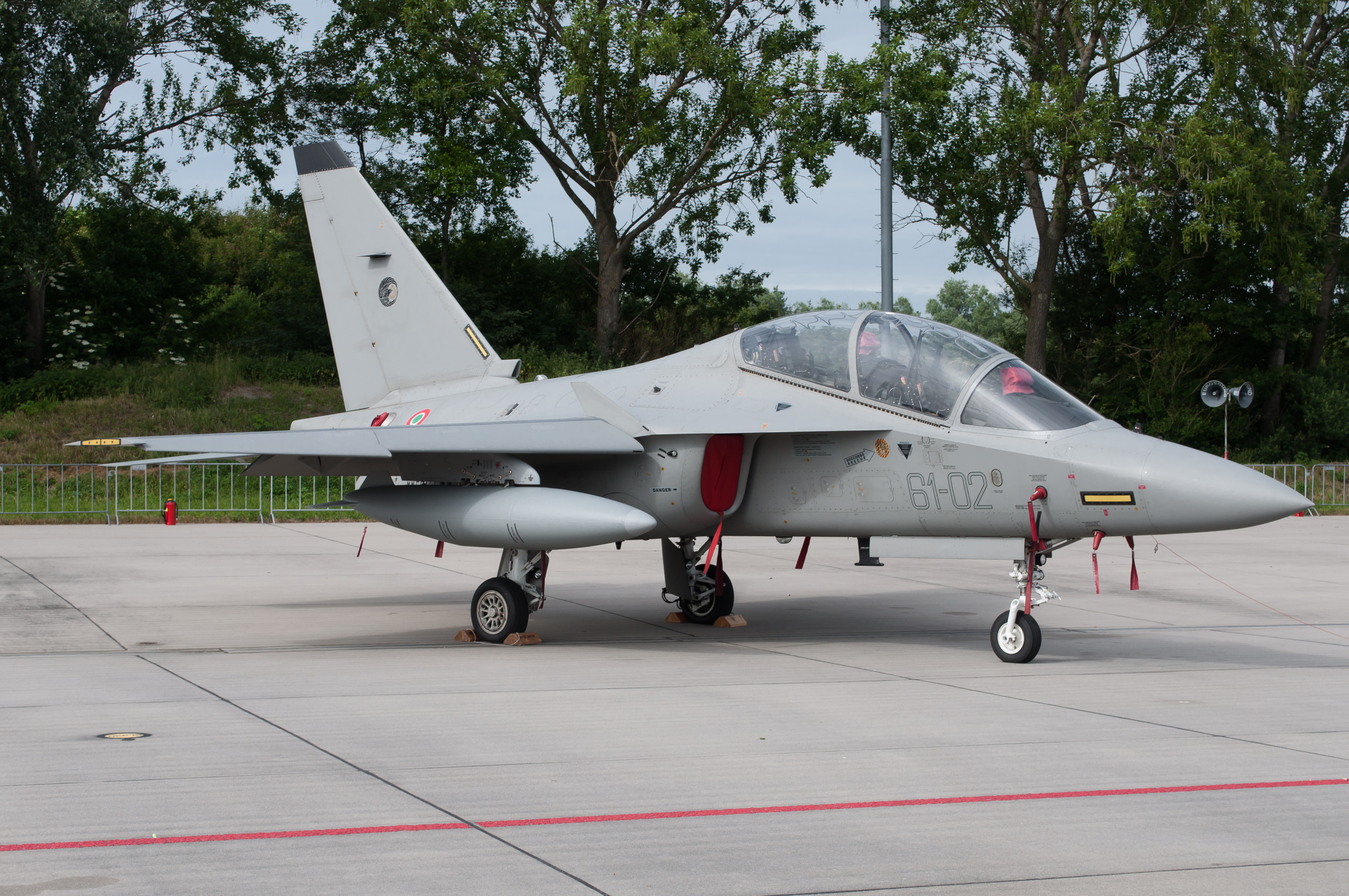 Leeuwarden, June 2016 KLu Open Dagen